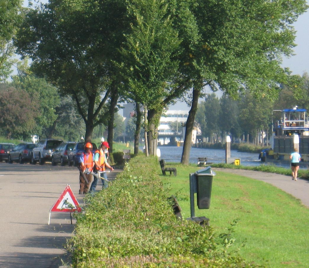 Onderhoud groenvoorziening, sept. 2006